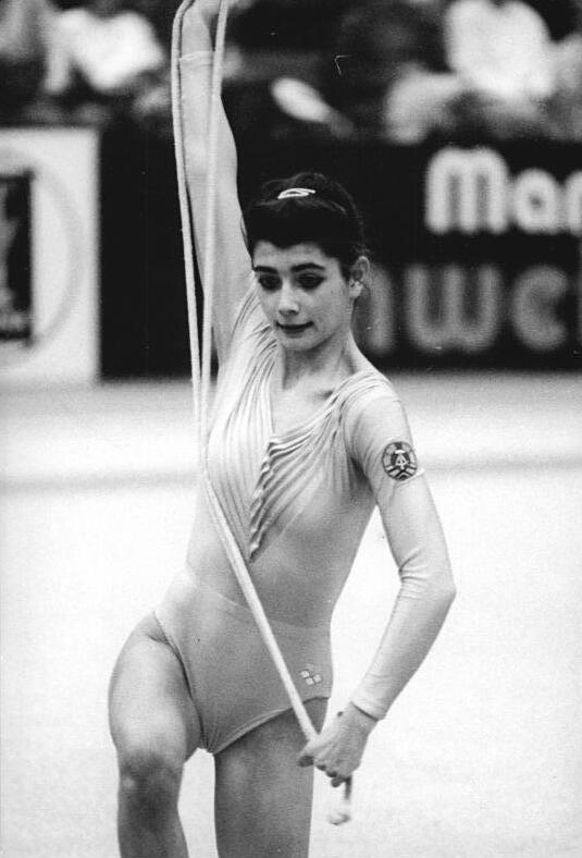 Esther Nicklas ADN-ZB Lehmann 1.4.89 Halle-Neustadt: 5. Internationales Turnier der Rythmischen Sportgymnastik um den GRHG-Pokal-Aussichtsreichste Bewerberin ist Esther Nicklas (SC Leipzig) von der DDR-Nationalmannschaft, die den Vergleich mit einem neuen Programm bestreitet - hier bei der Seilübung.